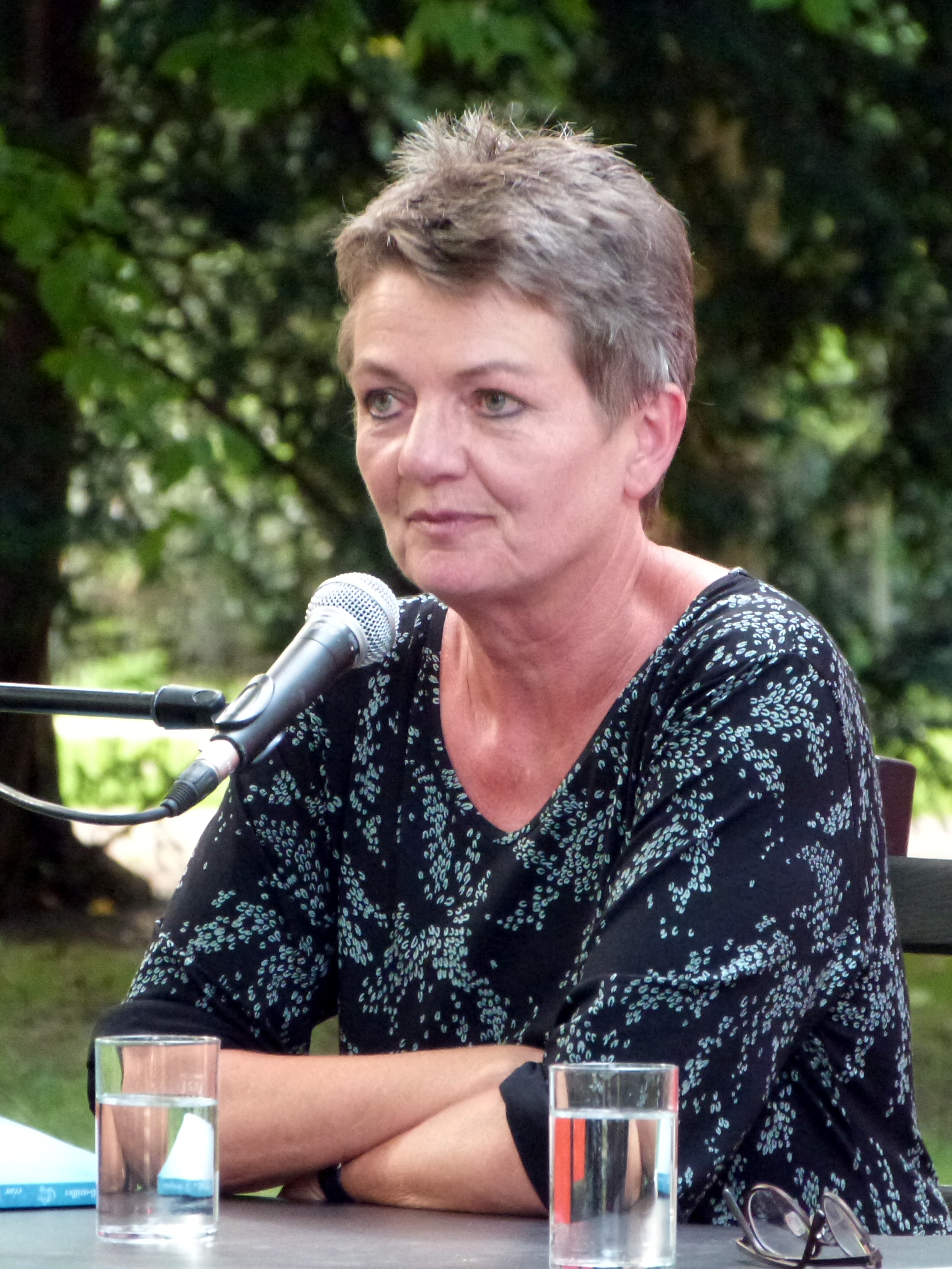 Die Schriftstellerin Kathrin Groß-Striffler beim Interview auf dem Erlanger Poetenfest 2017.